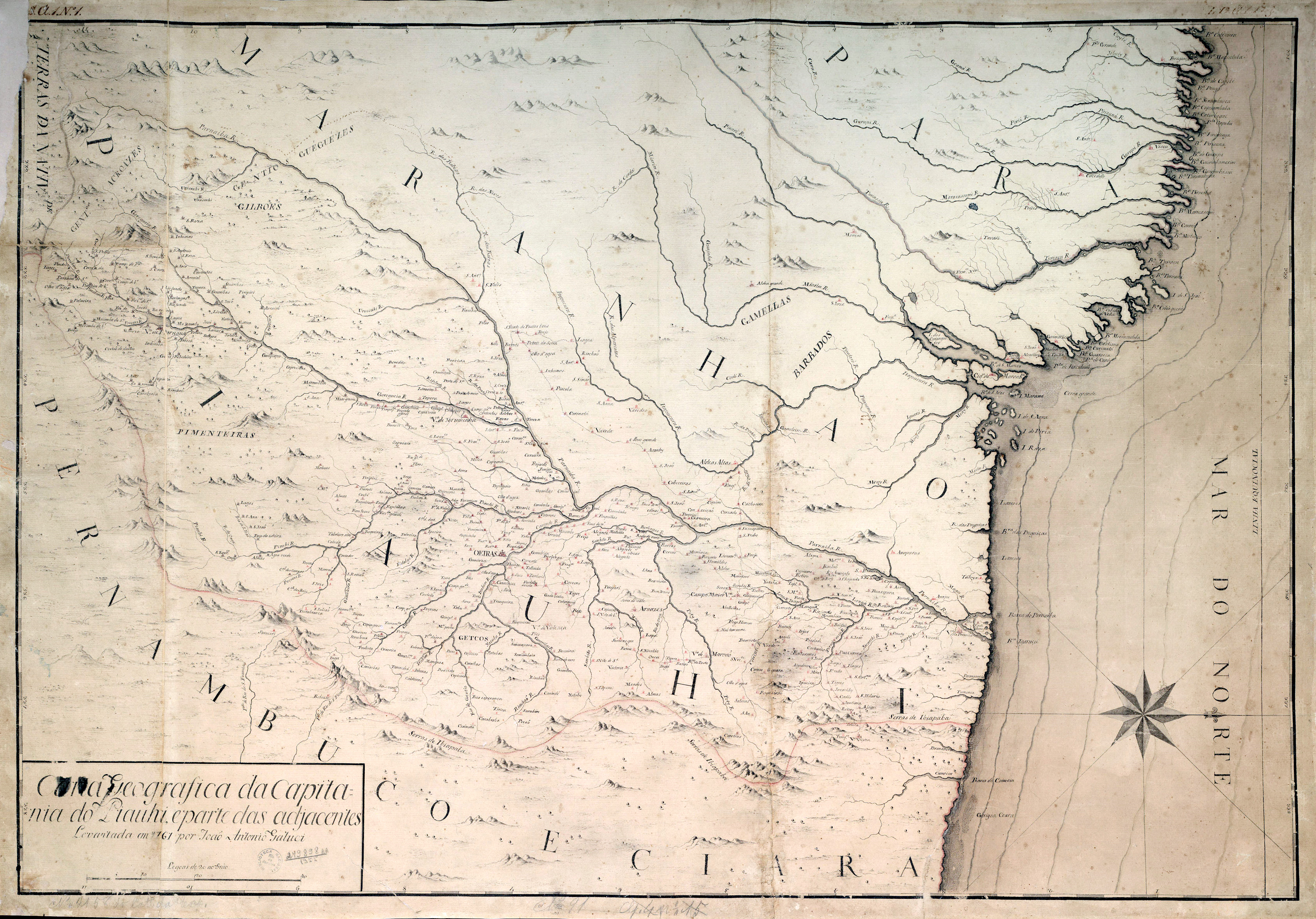 Carta geografica da Capitania do Piauhi por Henrique Antonio Galluzzi, 1761